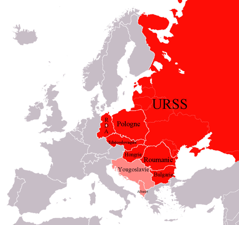 Version française de File:Eastern bloc.png.